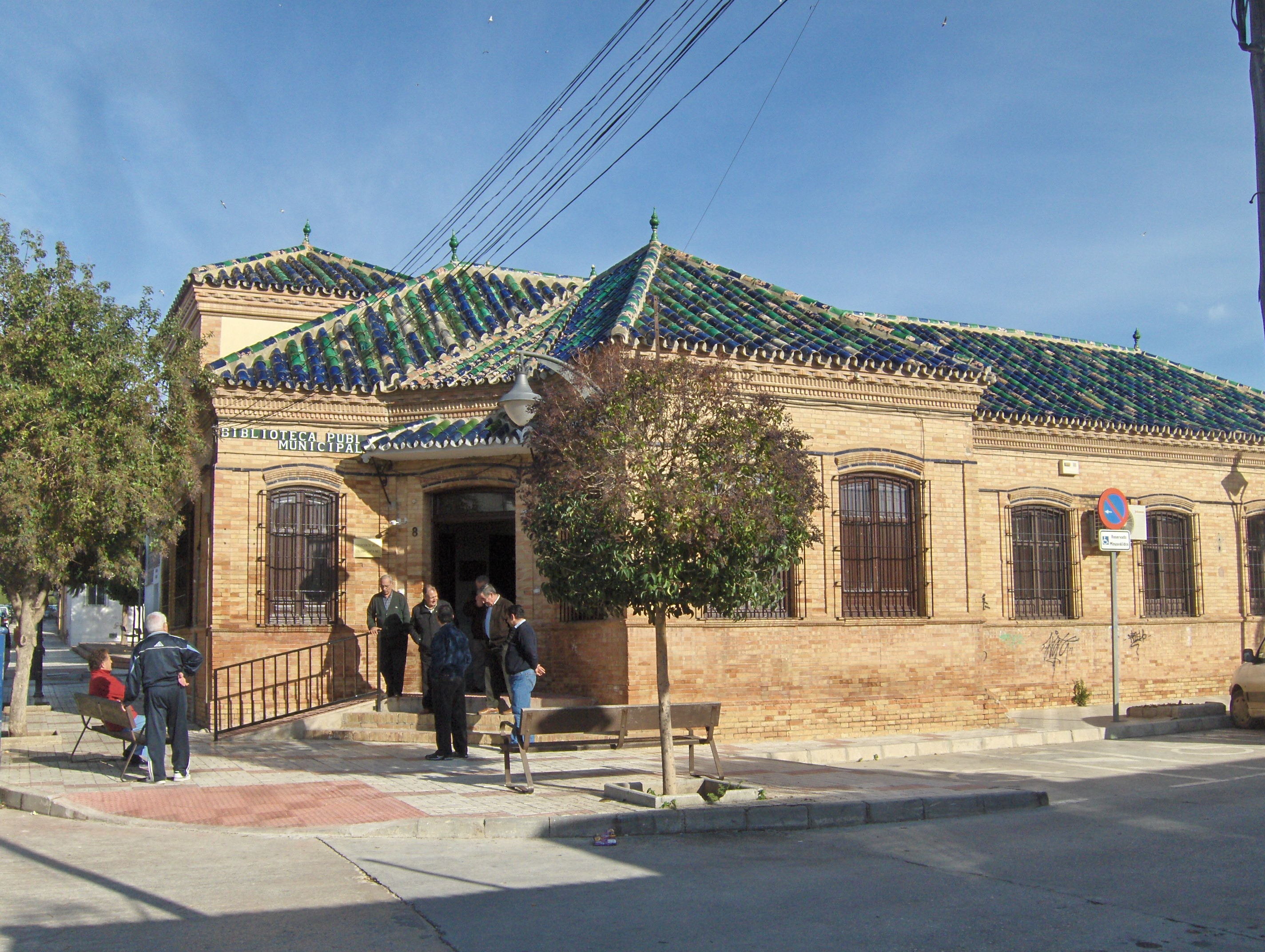 Biblioteca de la Colonia Santa Inés, Málaga, España.